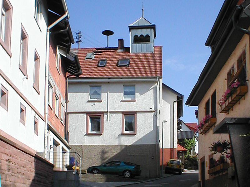 Rathaus von Pleutersbach, Ortsteil von Eberach (Neckar), Baden-Württemberg Deutschland